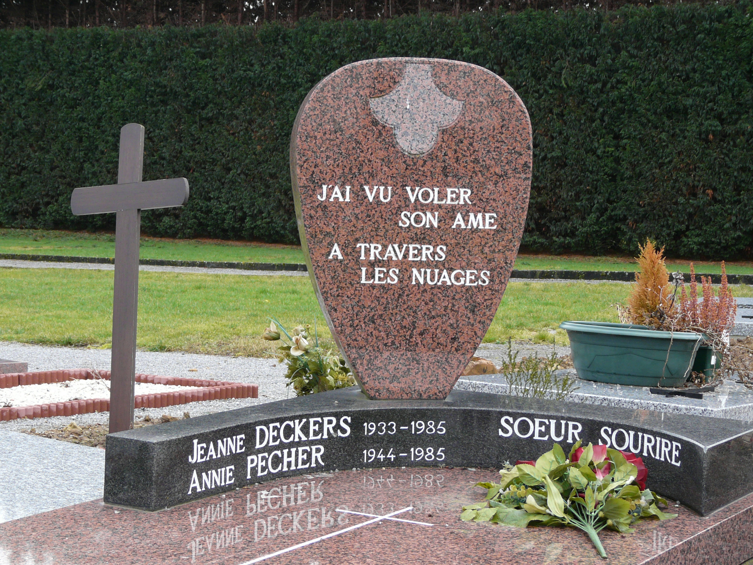 Tombe de Jeanne Deckers (Soeur Sourire) et de sa compagne Annie Pecher dans le fond du cimetière de Wavre (Belgique).